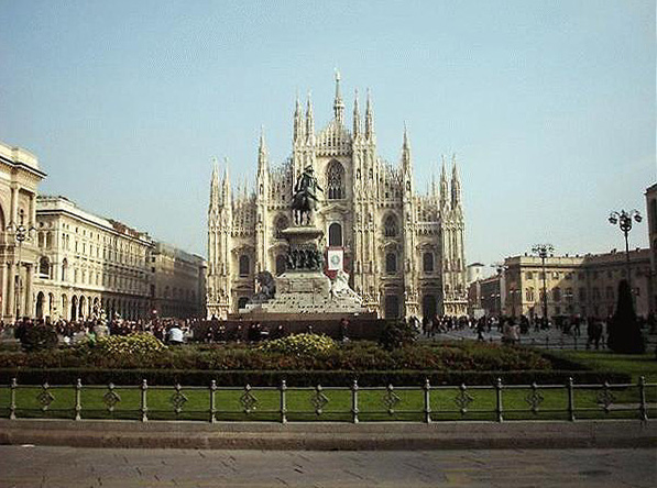 Il monumento a Vittorio Emanuele II e la facciata del Duomo in Piazza Duomo a Milano.